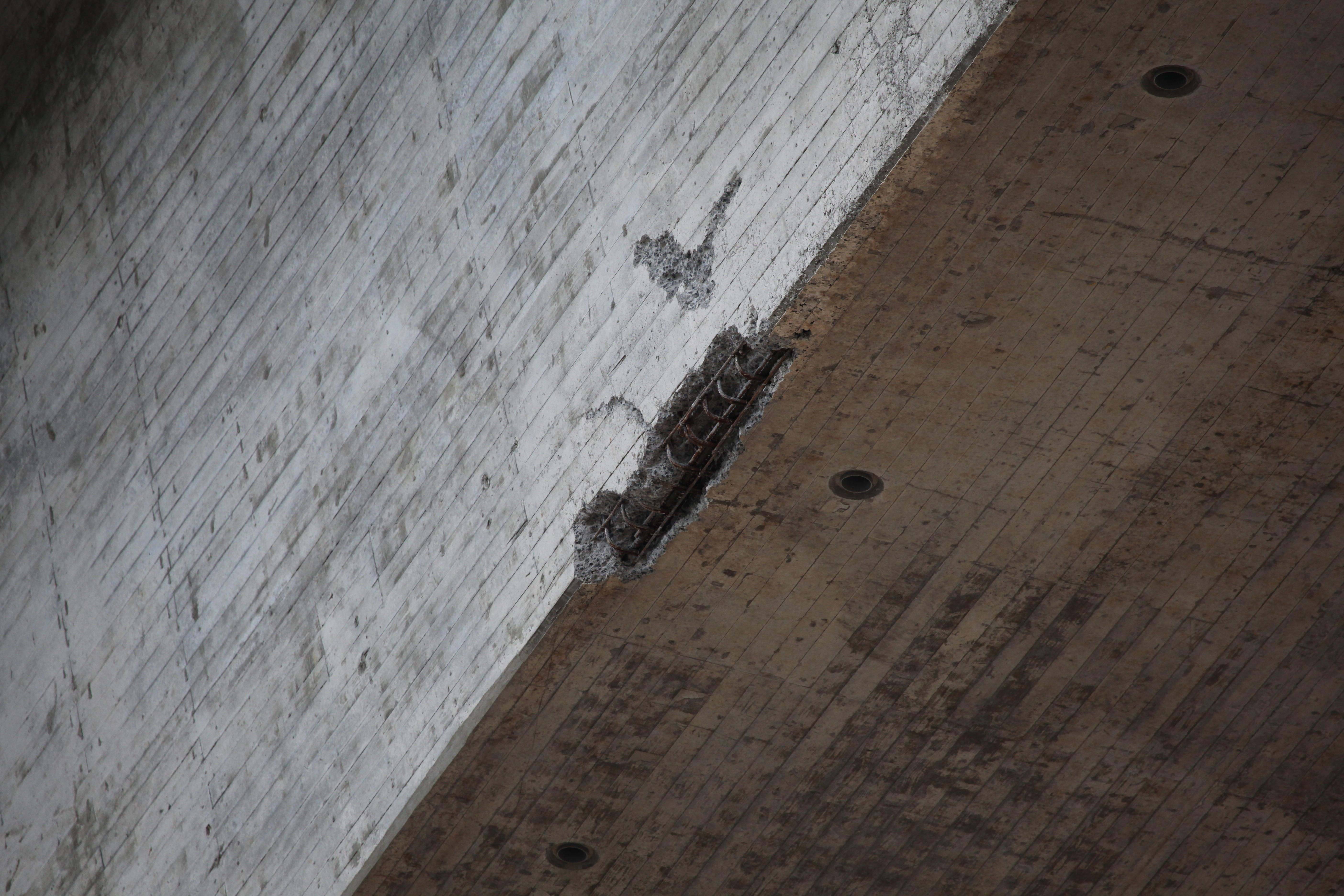 Füllbachtalbrücke bei Grub am Forst, Landkreis Coburg, Schaden UK Überbau